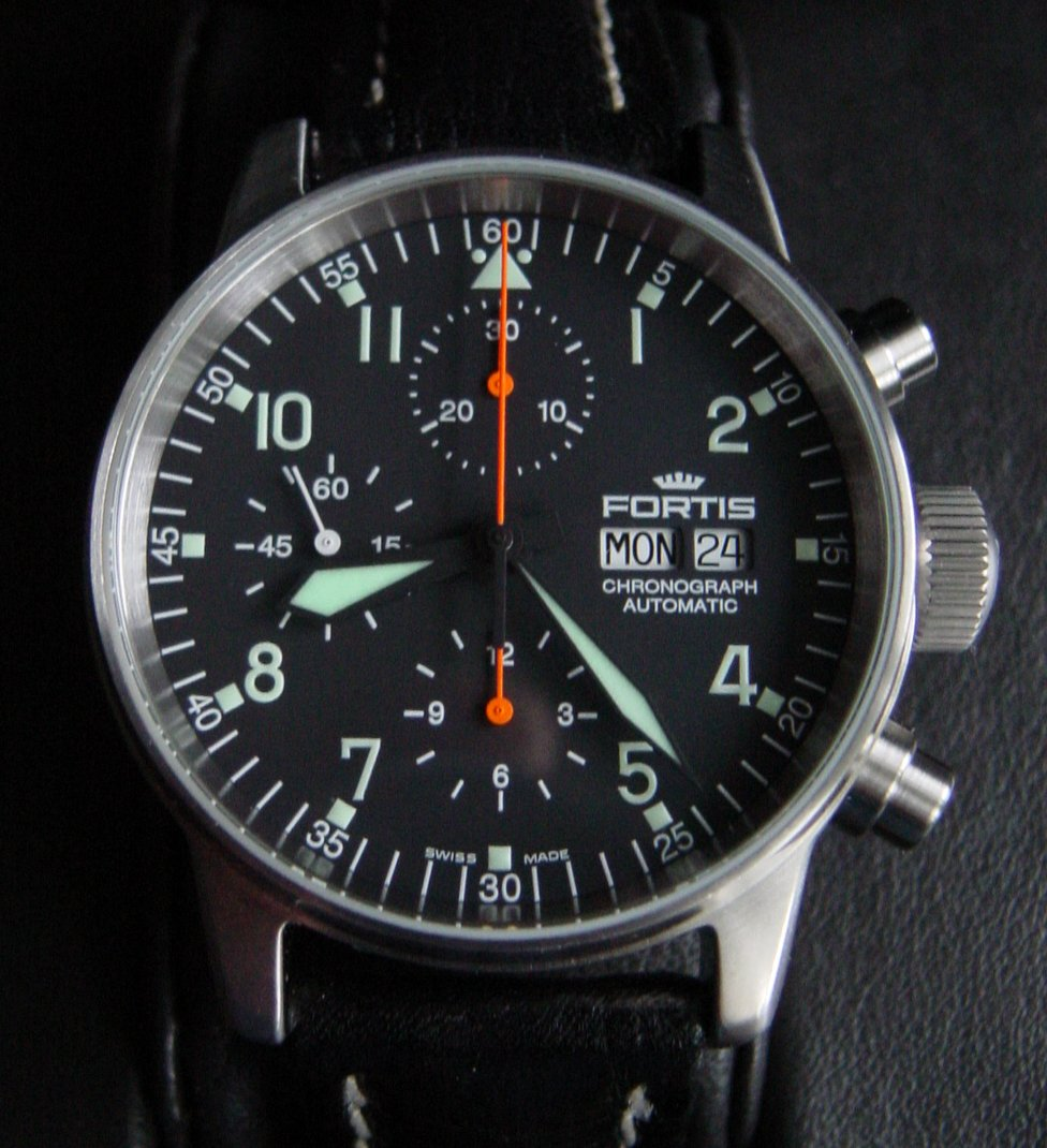 FORTIS Flieger Chronograph